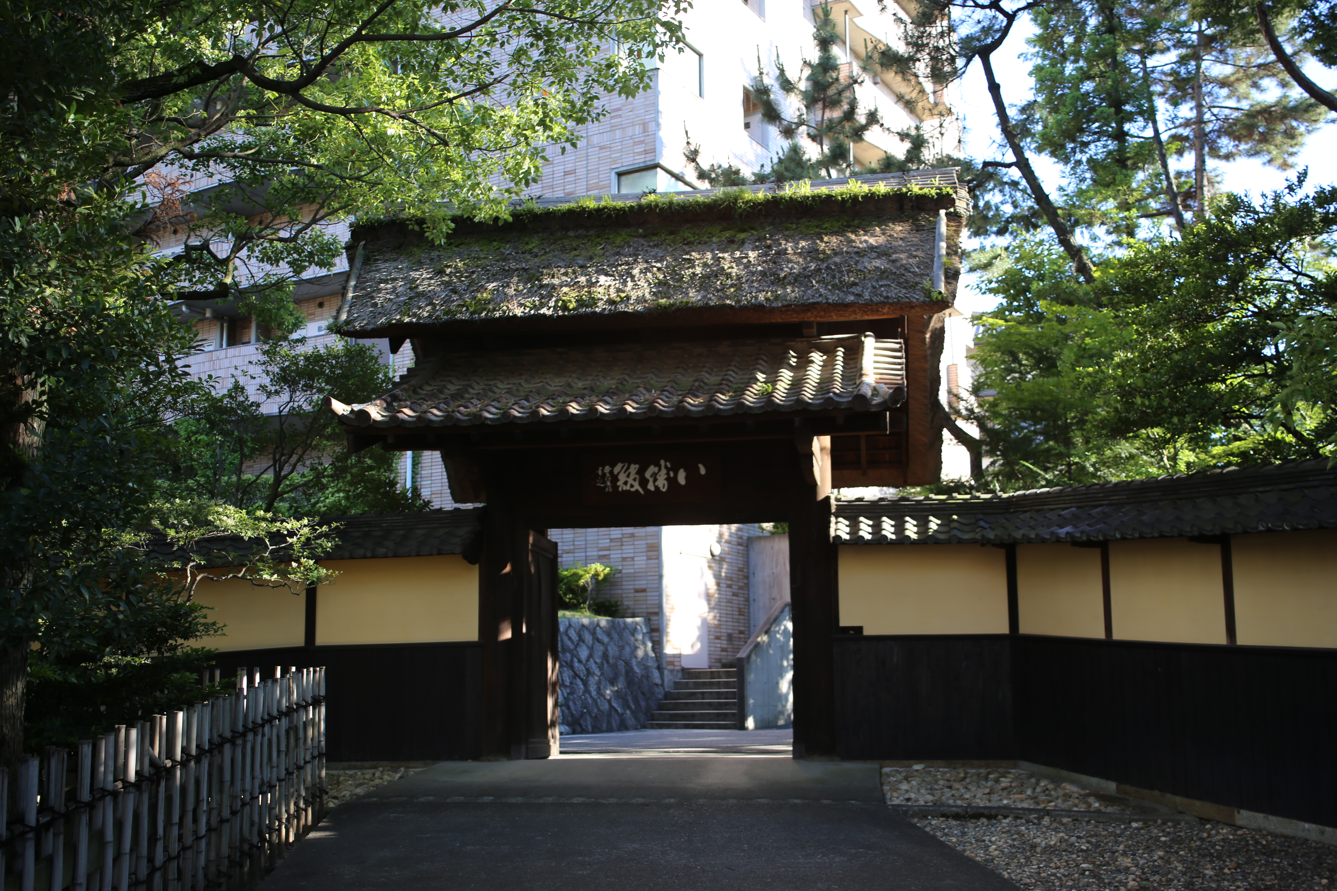 名古屋市昭和区広路町の八勝館入口を北側公道より撮影